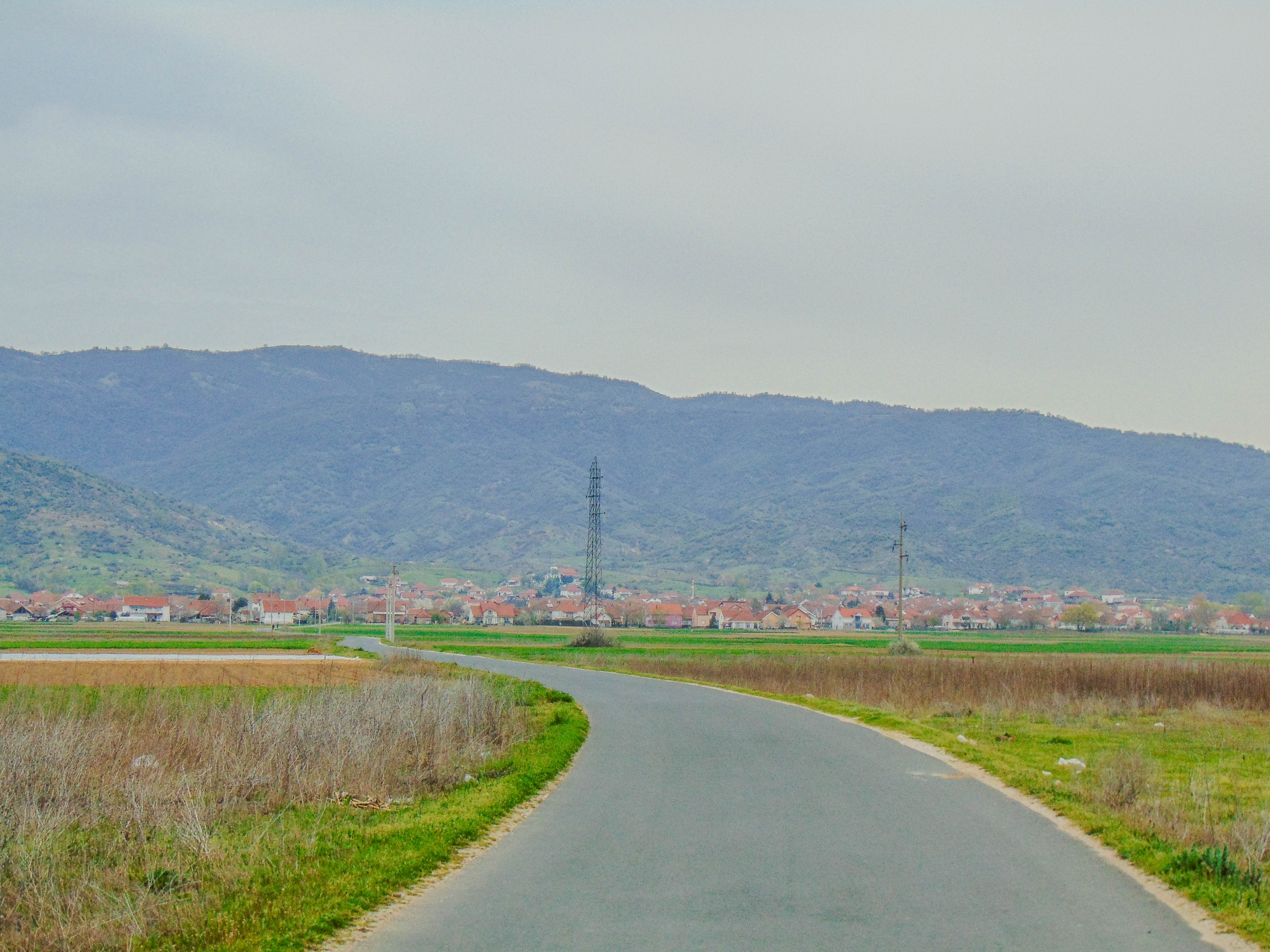 Сушица